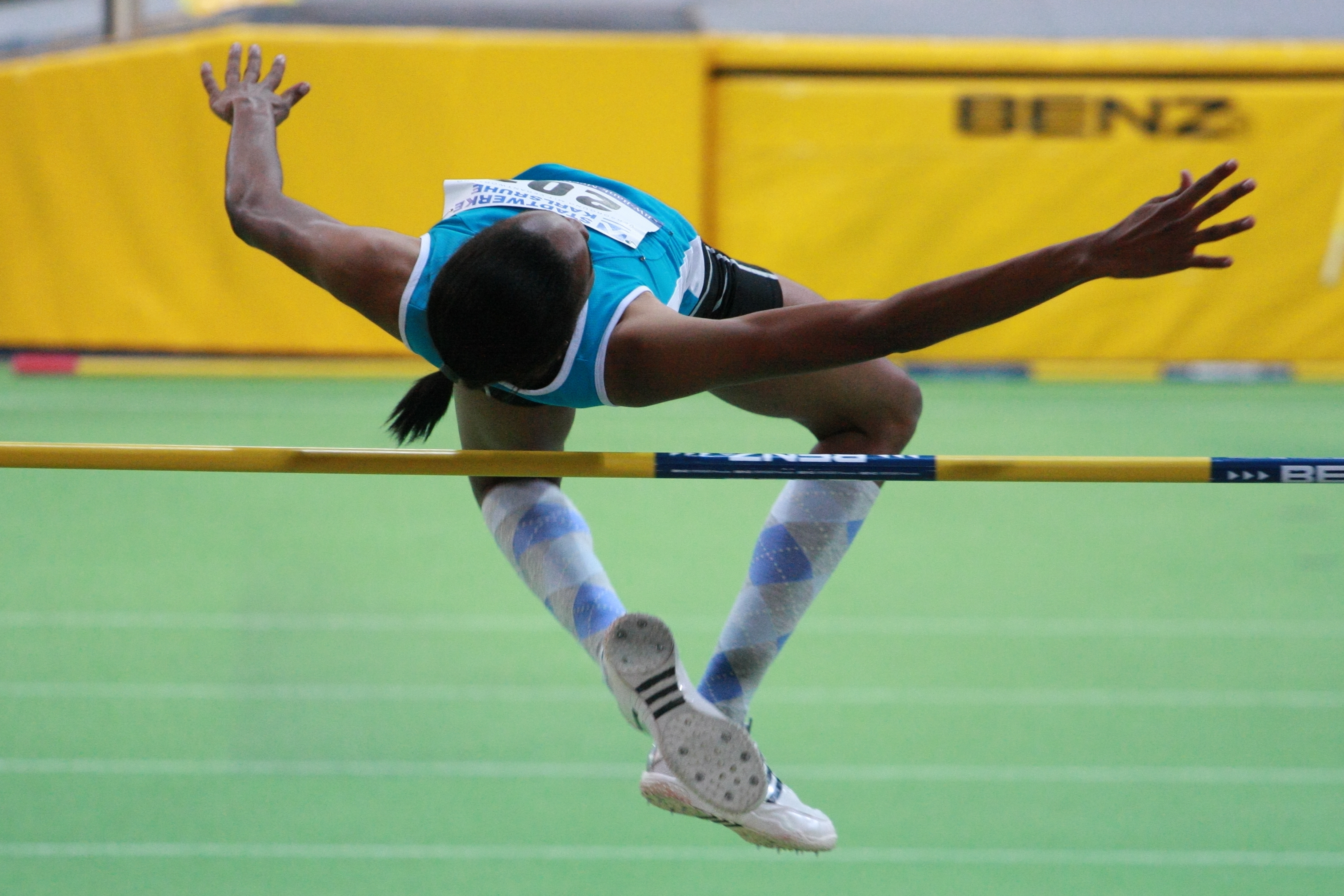 BW Bank Meeting Karlsruhe 2010